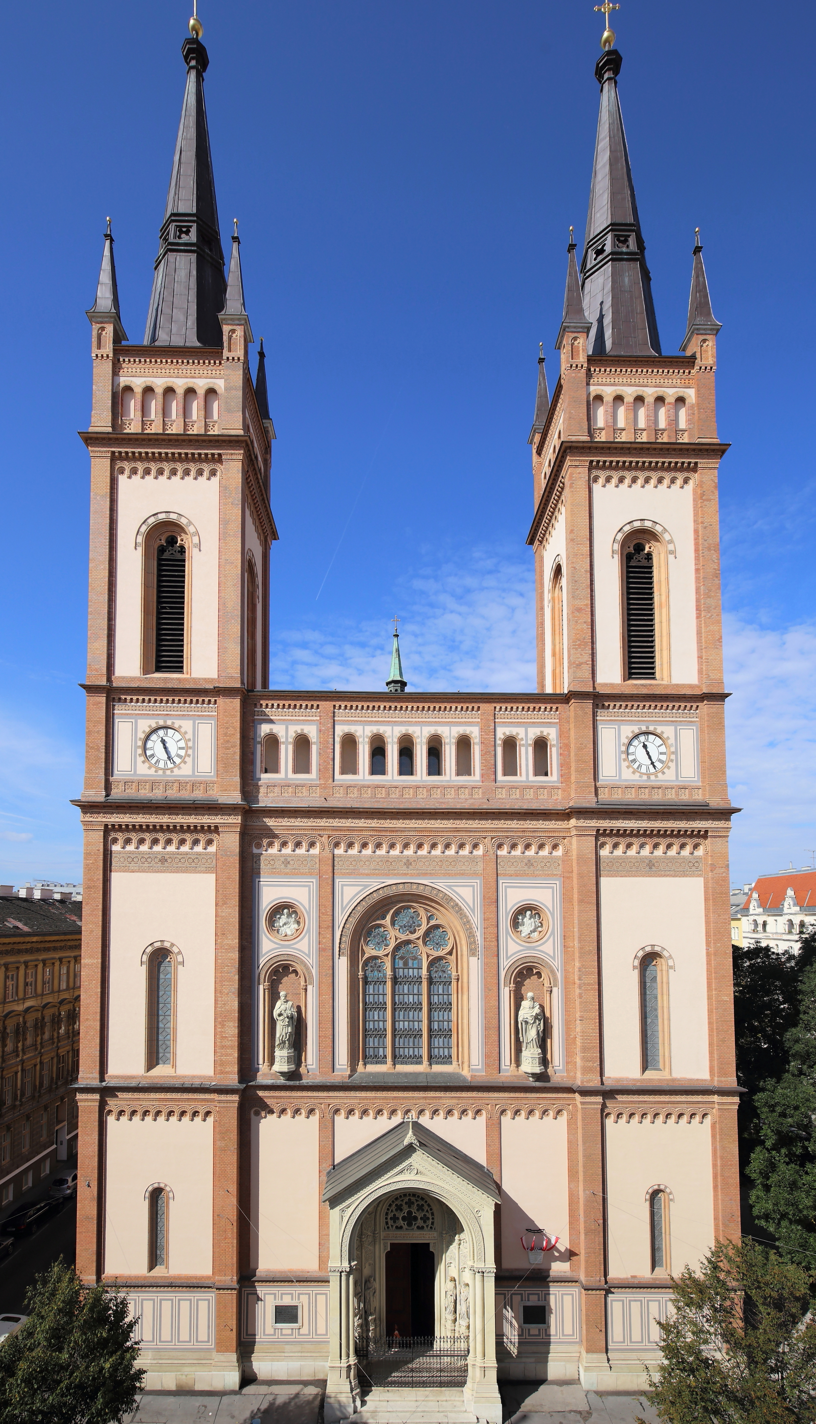 Hauptfassade der Altlerchenfelder Pfarrkirche im 7. Wiener Gemeindebezirk Neubau. Die Kirche wurde ab 1848 errichtet und 1861 geweiht. Die Statuen Apostel Petrus und Paulus über dem Hauptportal sind Werke des Bildhauers Johann Preleuthner.